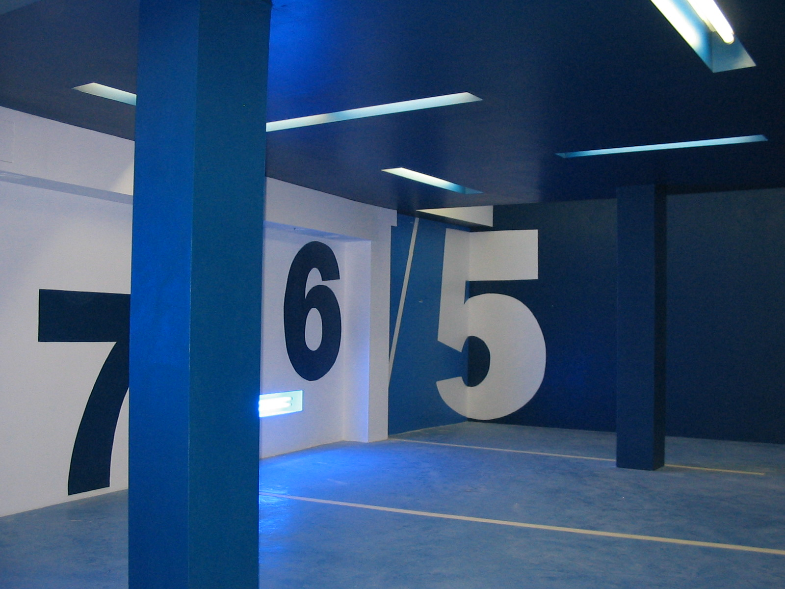 Fotografia scattata il 9 agosto 2007 a Milano